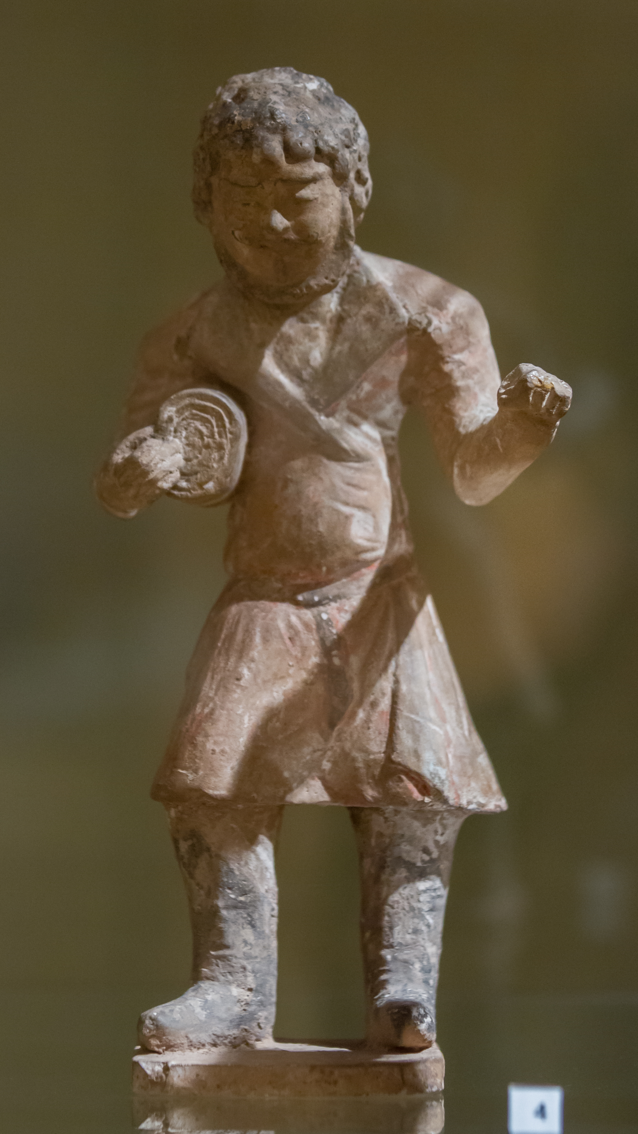 Marchand de tissu - Statuette Funéraire Mingqi Georges Labit Museum Native nameMusée Georges LabitLocationToulouse, FranceCoordinates43° 35′ 29″ N, 1° 27′ 32″ E Established1893Authority control VIAF: 137916323 SUDOC: 026394294 BNF: 118649905 Museofile: M0564